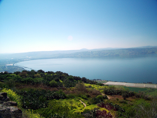 כְּפַר חָרוּב